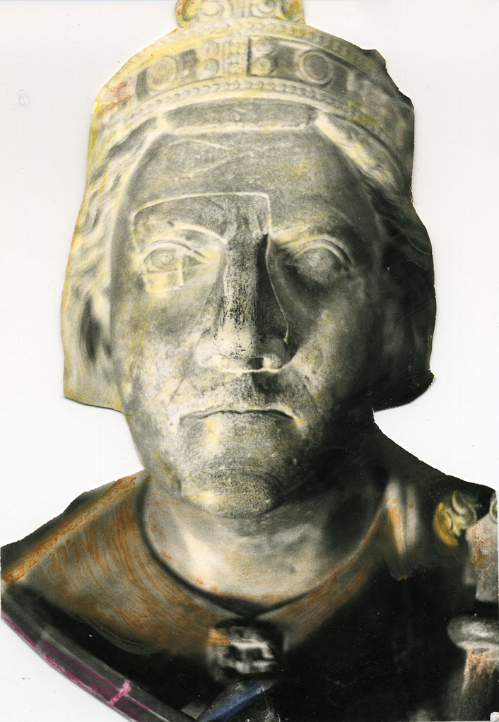 Photo du gisant de Richard Cœur de Lion dans la cathédrale de Rouen